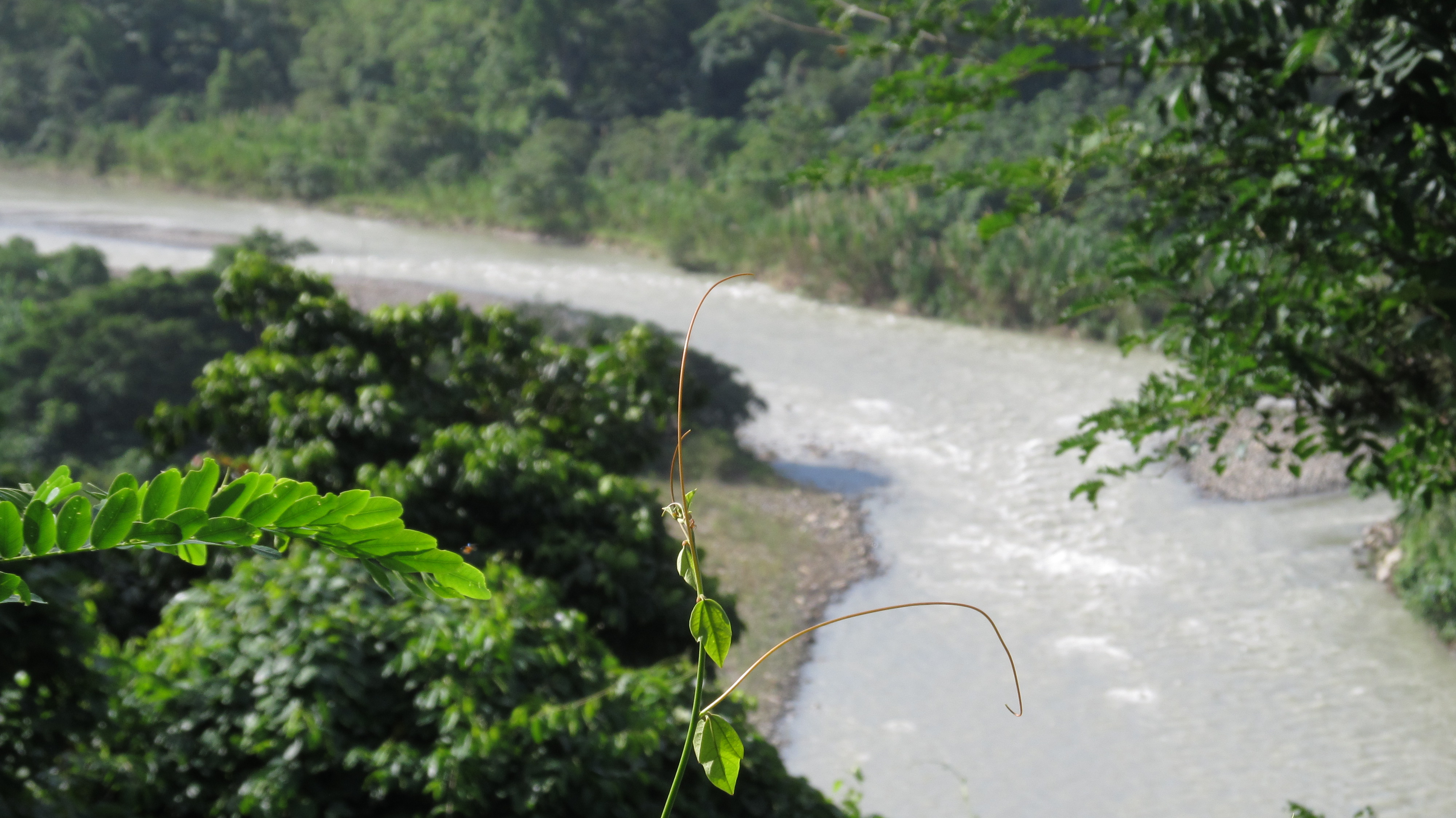 Foto tomada en la zona de la Chiguira, donde se aprecia el Río de Socopó (estado Barinas), Venezuela